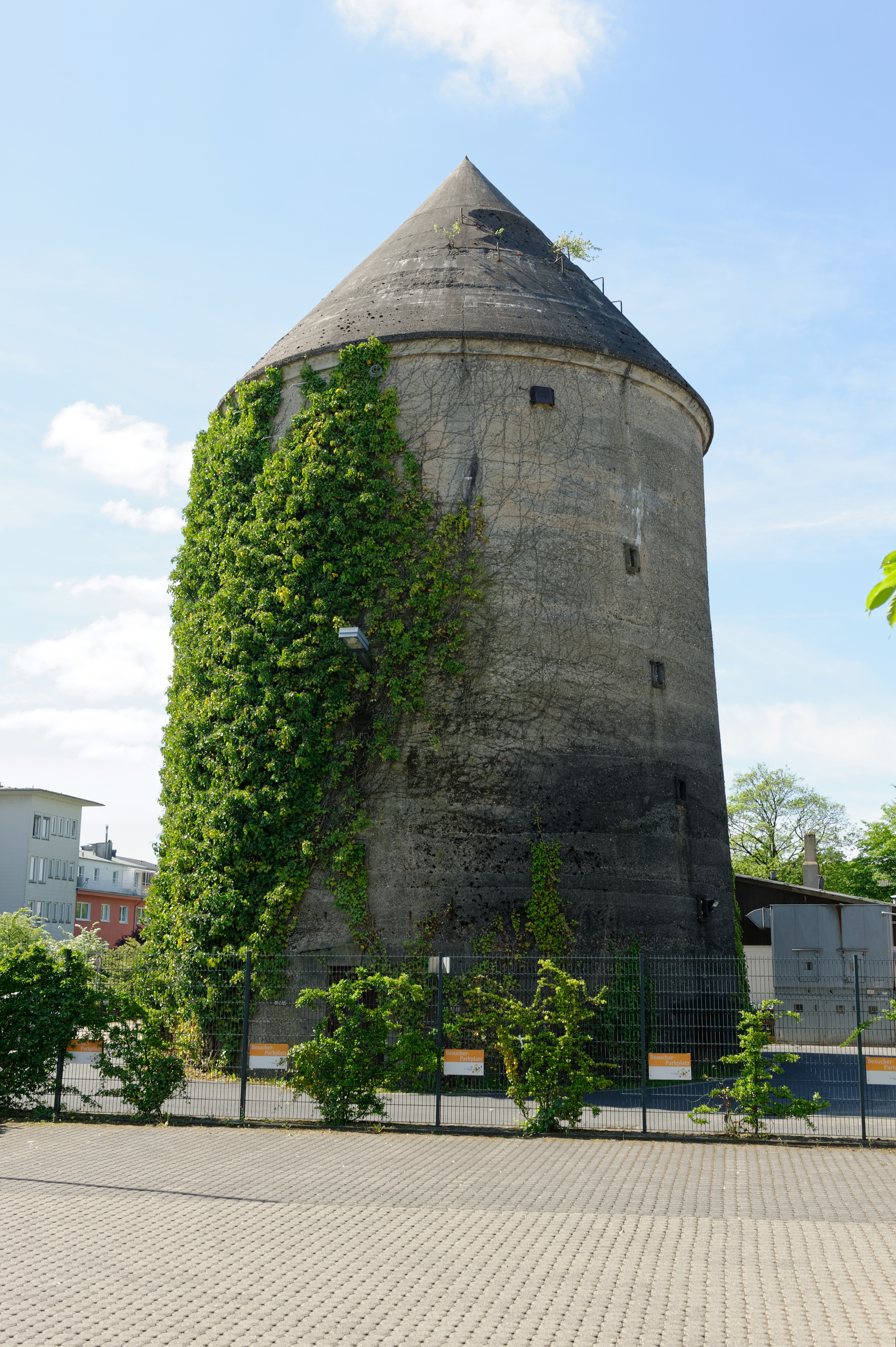 Stolpersteine in Solingen